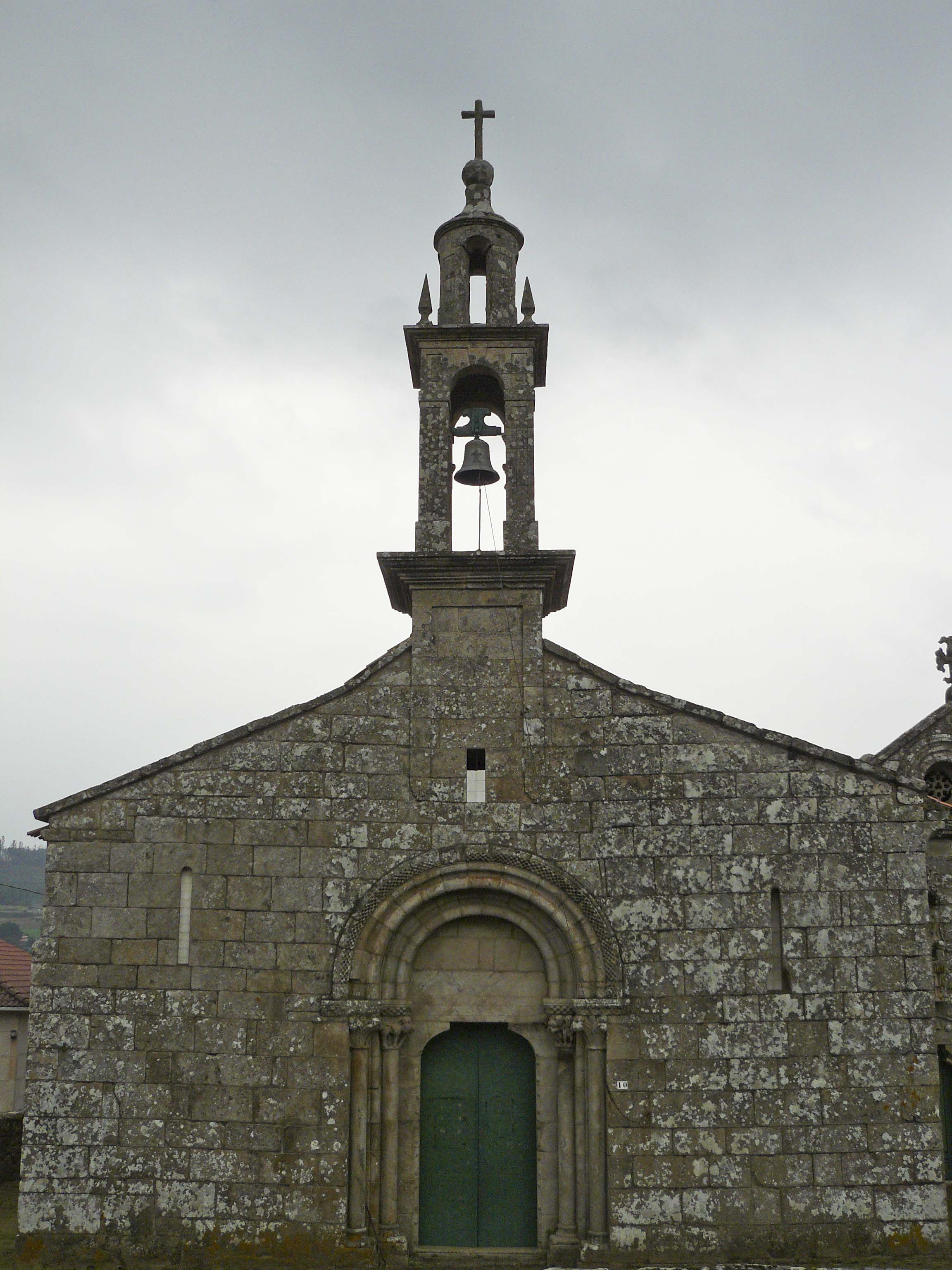 Fachada occidental de Igrexa de San Pedro de Ansemil